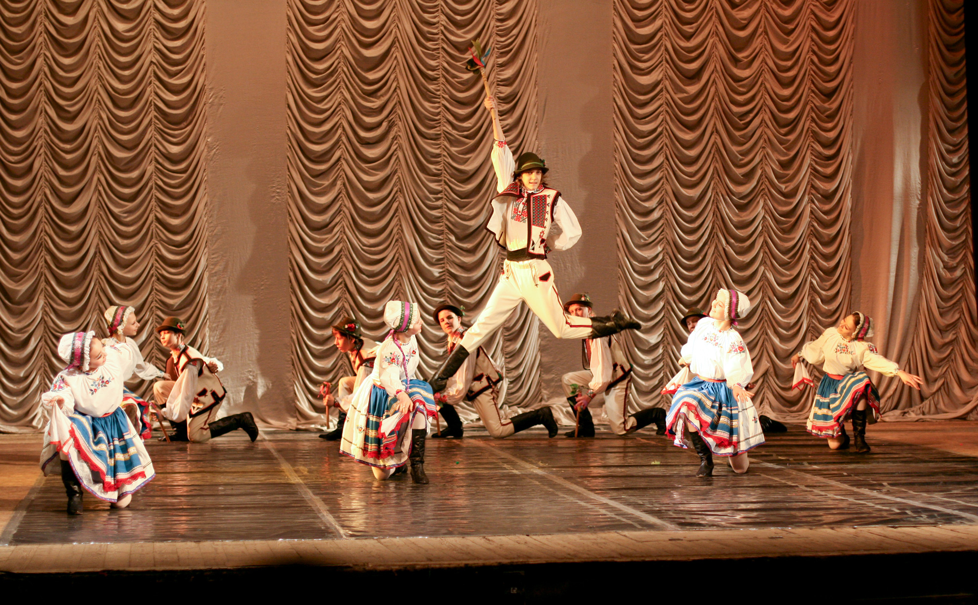 Культурный Центр Кияночка